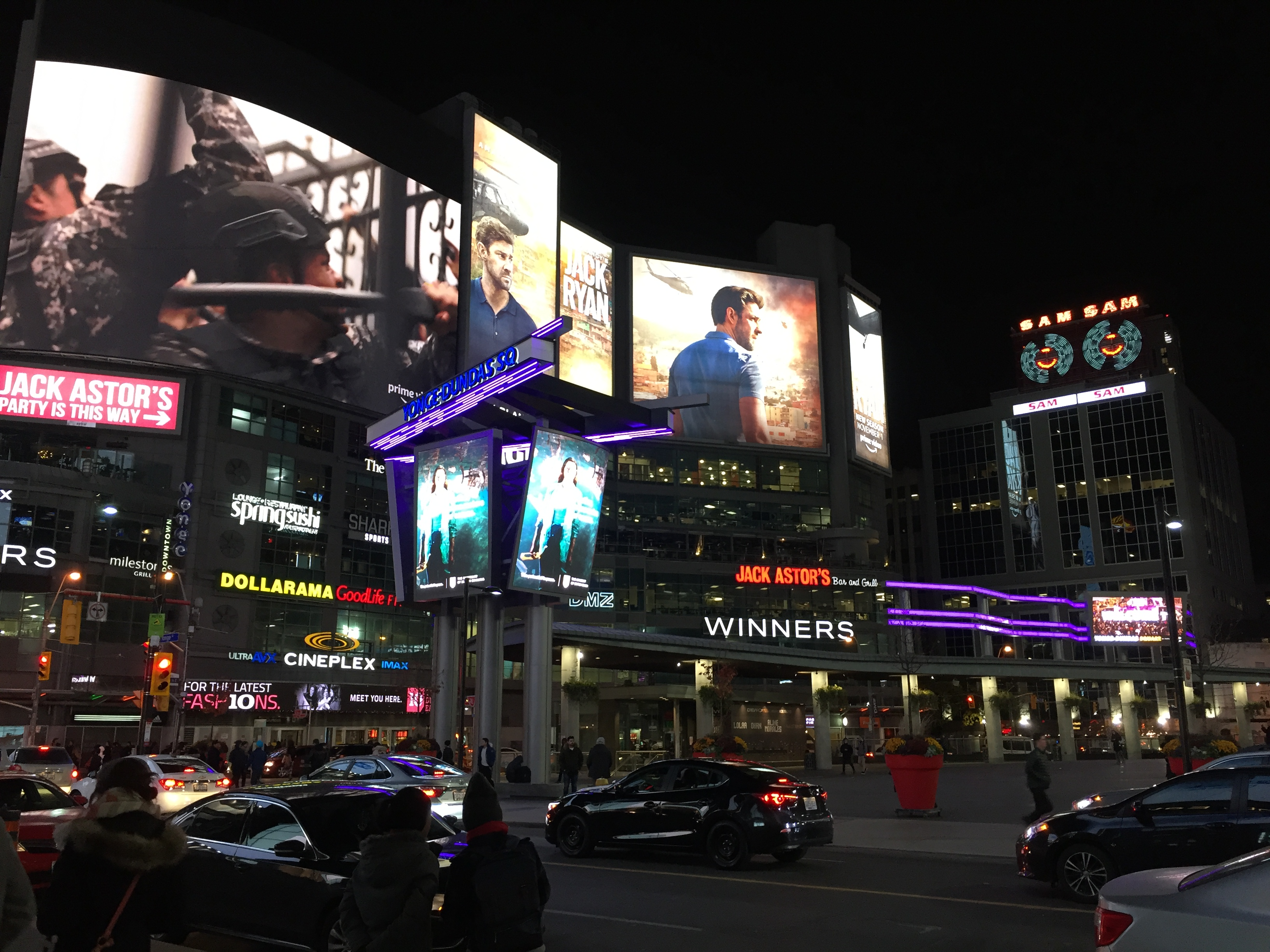 کوردی: گۆڕەپانی یانگ - دەنداس بەکاتی شەو